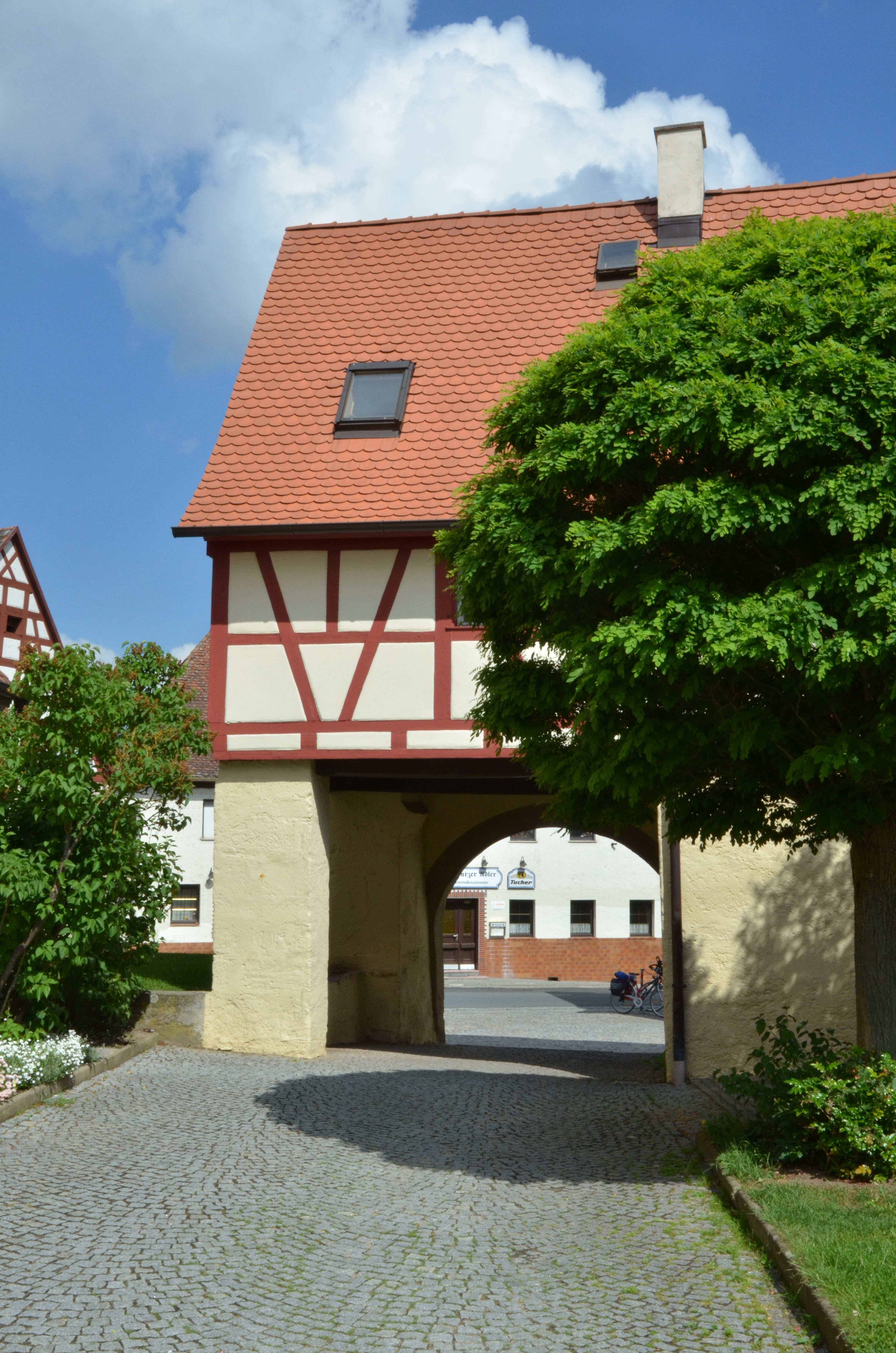 evang.-luth. Kirche St. Michael in Trautskirchen, Eingangstor